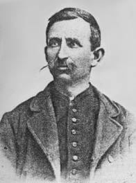 Porträt von Josef Gabriel der Ältere (1853-1927)